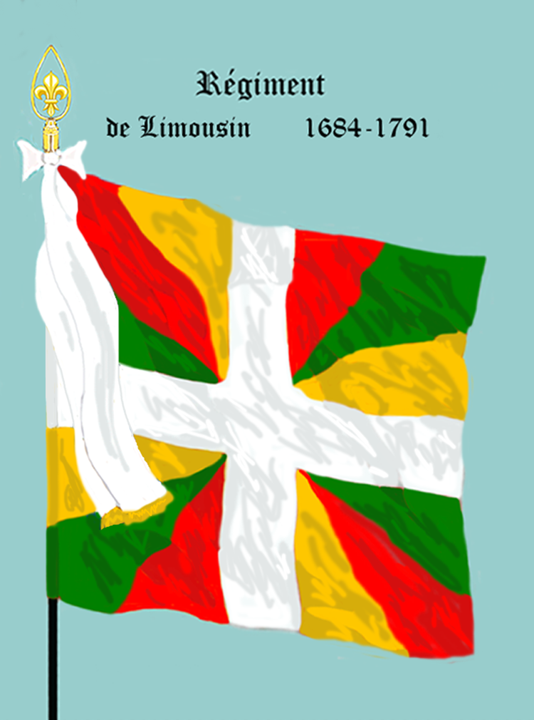 Ordonnanzfahne eines königlich französischen Infanterie-Regiments. - Entnommen und überarbeitet aus: „LES UNIFORMES ET LES DRAPEAUX DE L'ARMÉE DU ROI“ Marseille 1899. (Drapeau d'Ordonnance d' un régiment française d'infanterie royale.)